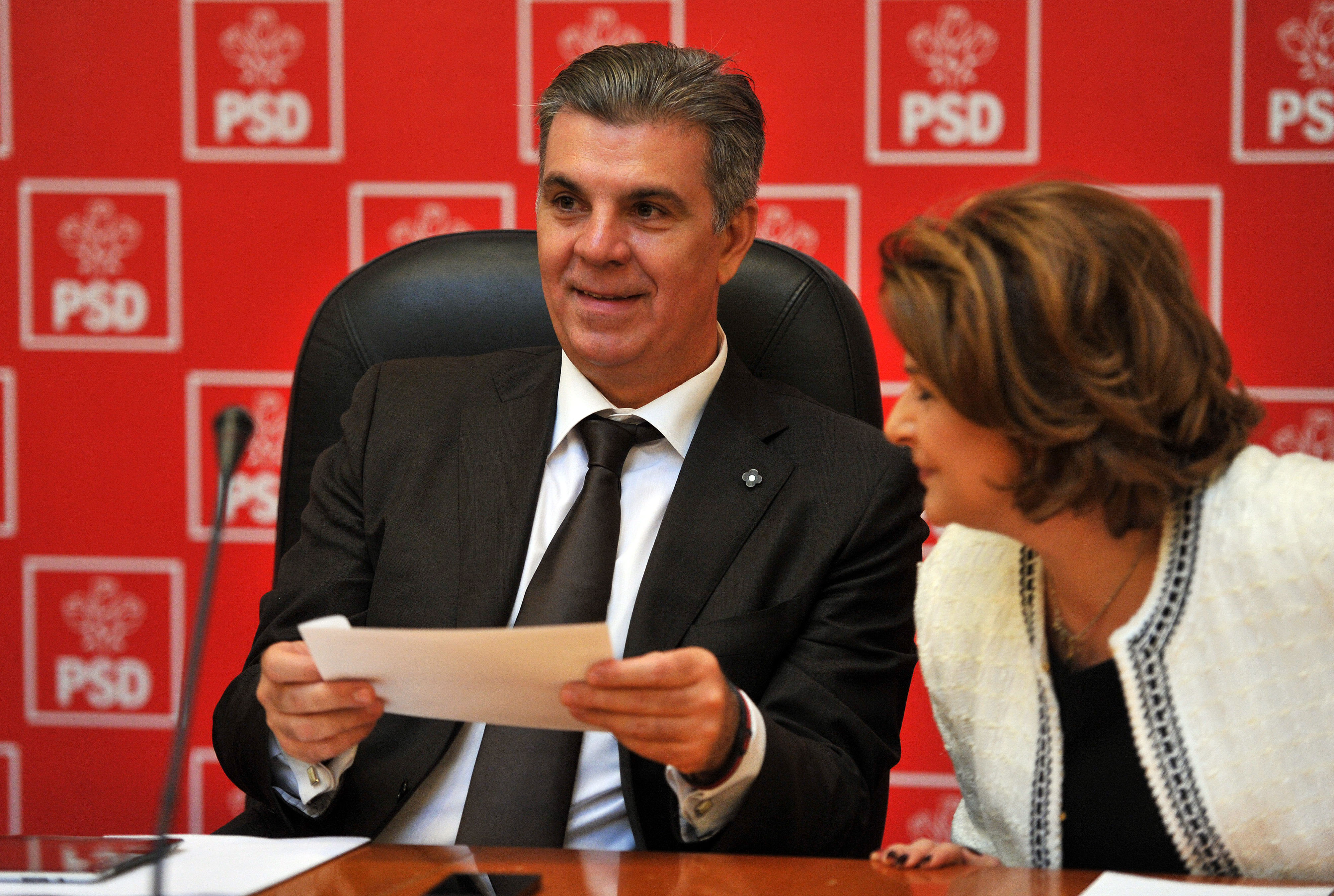 Valeriu Zgonea si Rovana Plumb la CExN PSD, Palatul Parlamentului